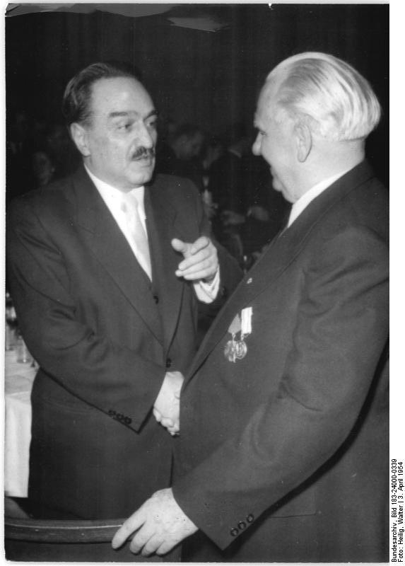 ADN-ZB-Heilig 3.4.1954 IV. Parteitag der Sozialistischen Einheitspartei Deutschlands, Berlin, Werner-Seelenbinder-Halle Der Präsident der Deutschen Demokratischen Republik Wilhelm Pieck gab am 3.4.1954 im Haus der Ministerienzu Berlinaus Anlass des IV Parteitages der Sozialistischen Einheitspartei Deutschlands einen Empfang. Die Mitglieder des Staatlichen Volkskunstensembles der Deutschen Demokratischen Republik, spielten, sangen und tanzten für die Teilnehmer an dem Empfang. UBz.: Der Präsident der Deutschen Demokratischen Republik Wilhelm Pieck, im Gespräch mit dem Stellvertreter des Ministerates der UdSSR, A.I. Mikojan